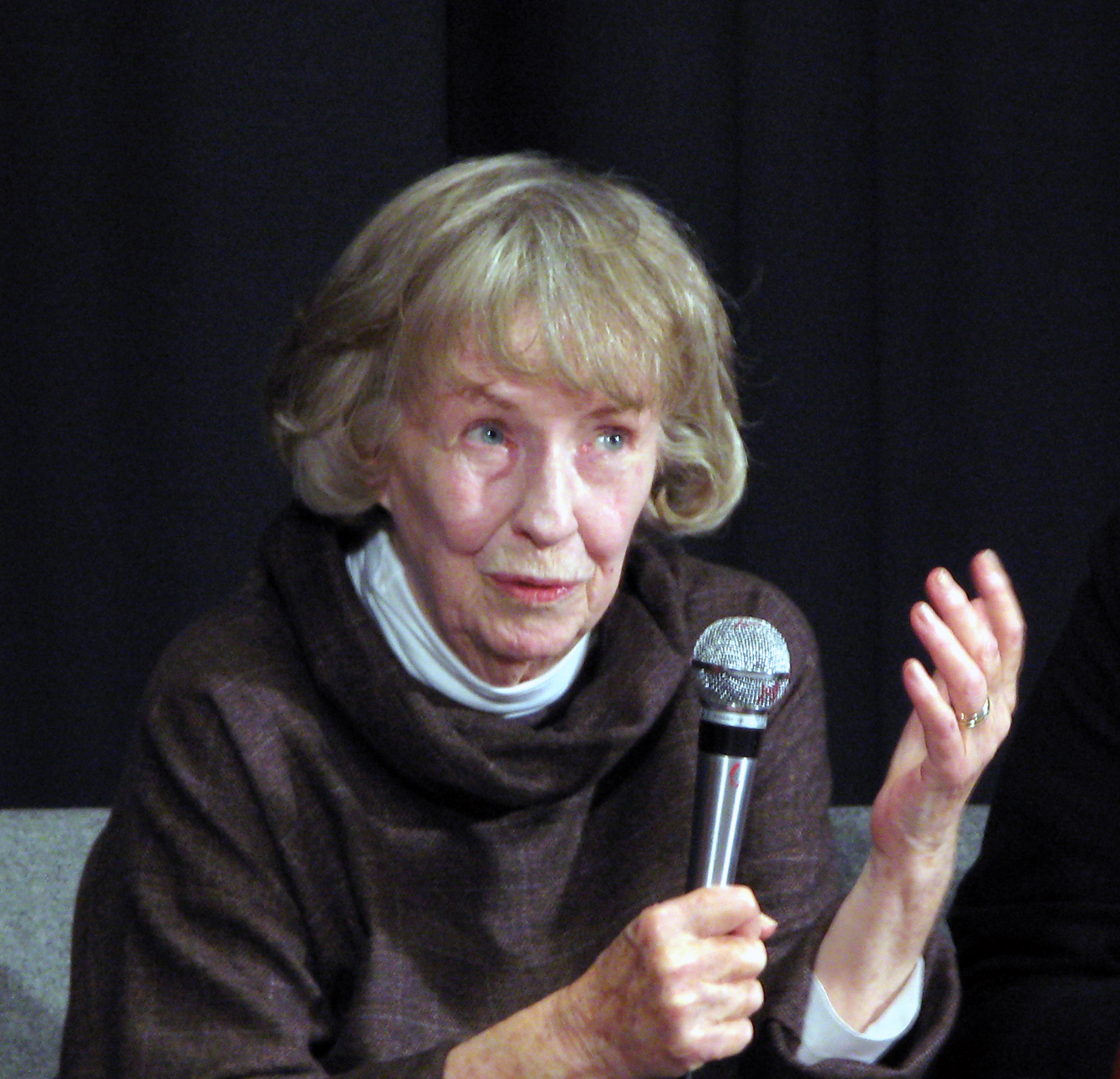 Betsy Blair, à Amiens (France) - Lors de la table ronde "autour de l'oeuvre de Karel Reisz", avec Michel Ciment et Gilles Laprévotte (à la "Maison de la Culture") lors du « 27ème Festival international du film d'Amiens ».